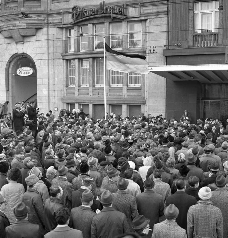 Zentralbild/Link 19.3.1970 Erfurt: Treffen Stoph-Brandt Hunderte Erfurter Bürger brachten vor dem Eingangsportal des Interhotels "Erfurter Hof" in lauten Sprechchören ihre an den westdeutschen Bundeskanzler gerichtete Forderung nach Völkerrechtlicher Anerkennung der DDR vor.